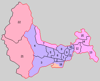 岩手県和賀郡の町村。